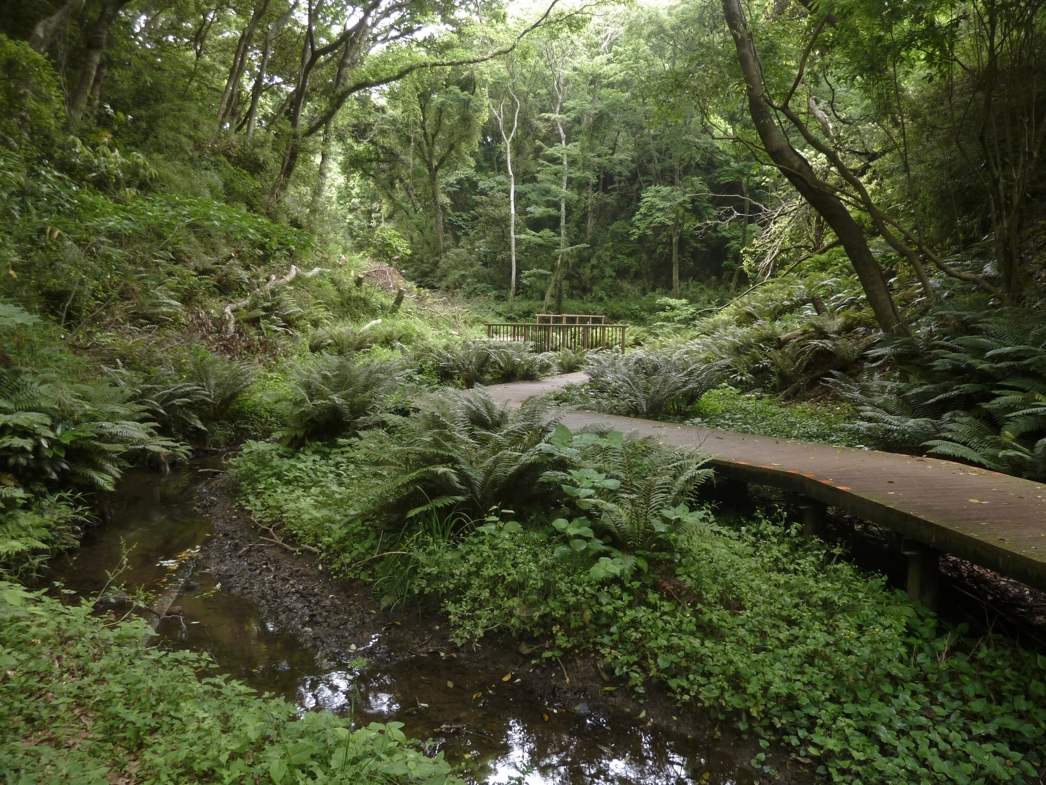 神奈川県三浦市・「小網代の森」浦の川源流域。アスカイノデが目立つ。